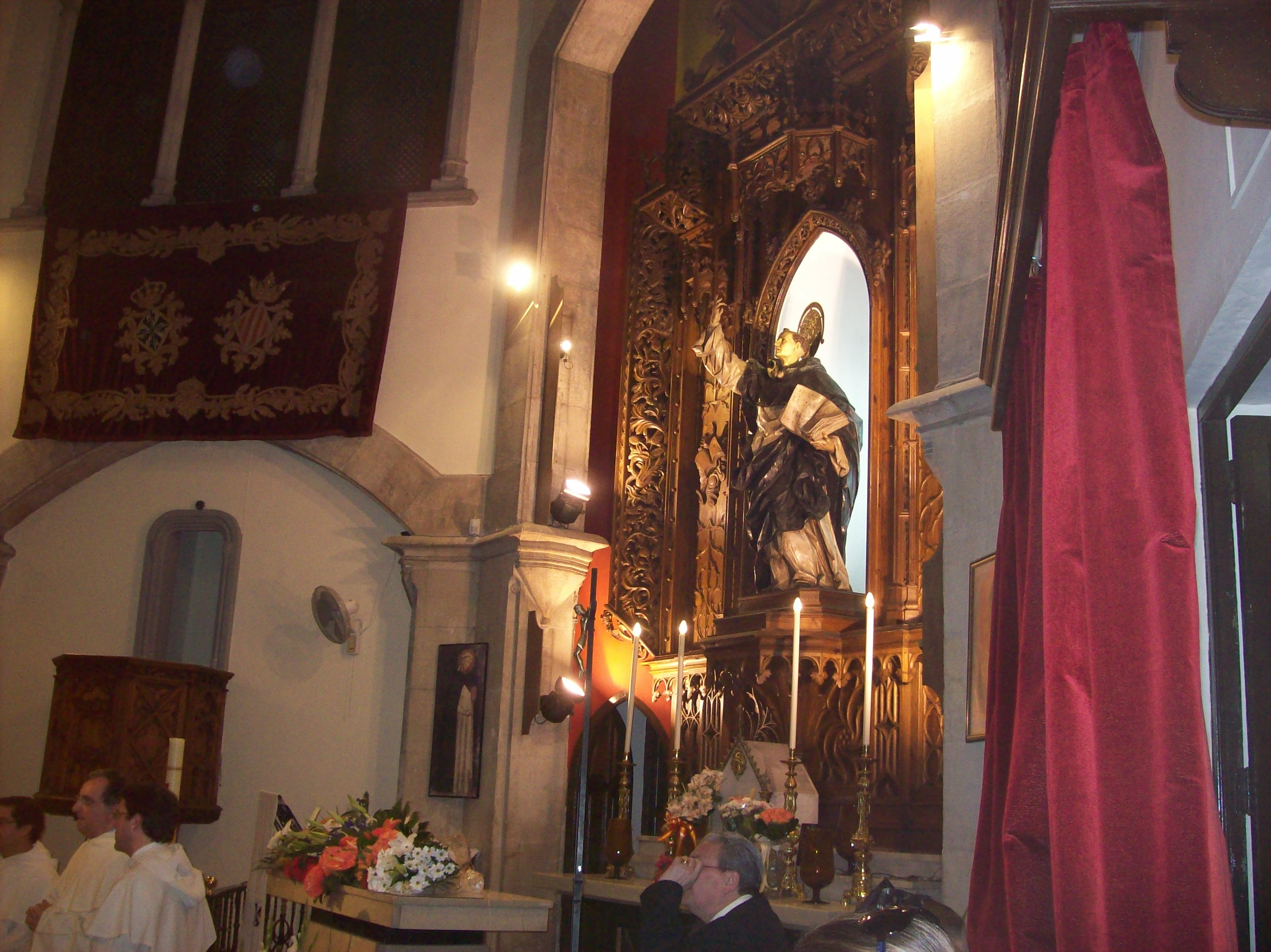 Imatge de San Vicent en la seua casa Natalícia en València.